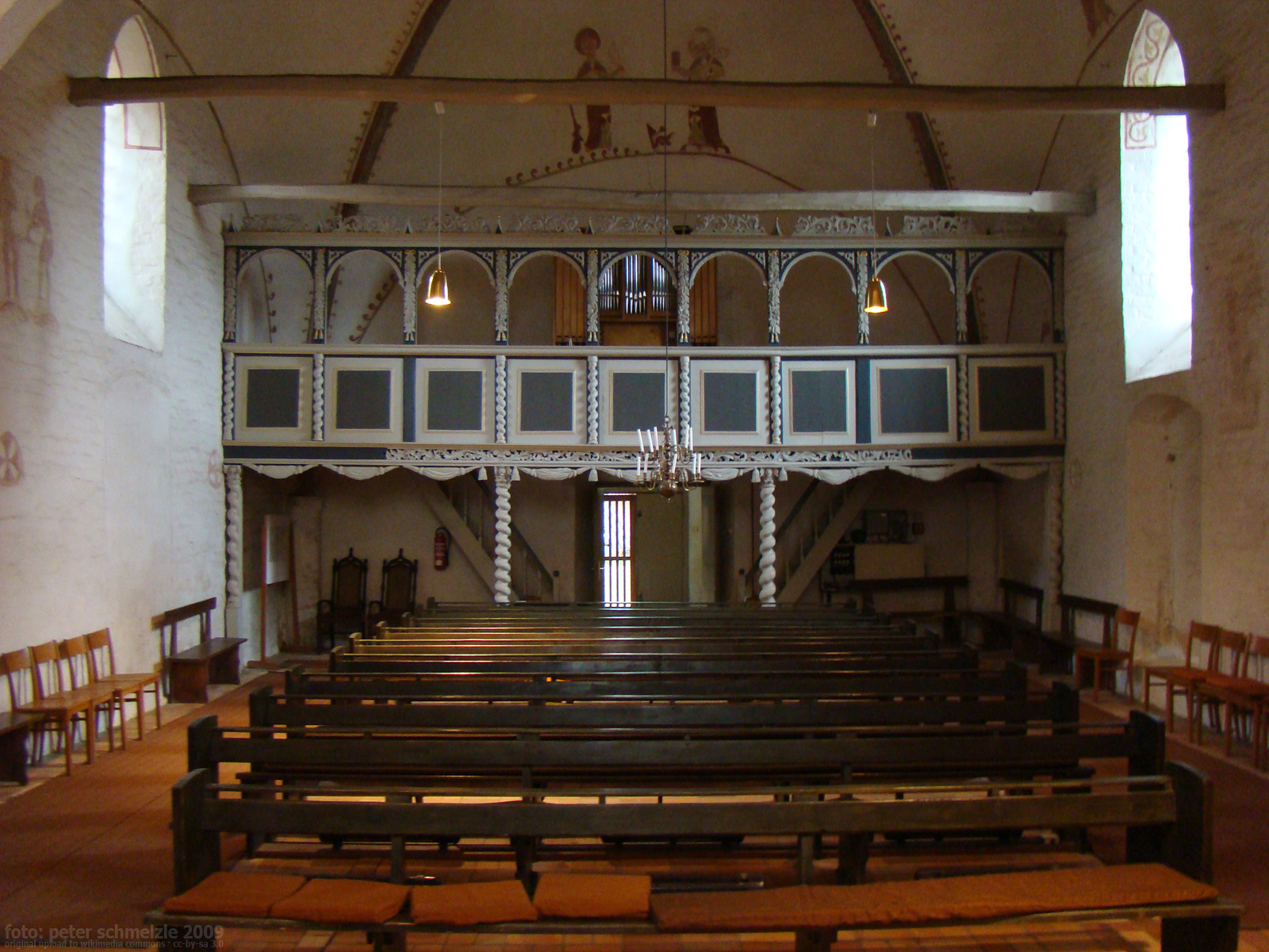 Dorfkirche Walkendorf, Westempore